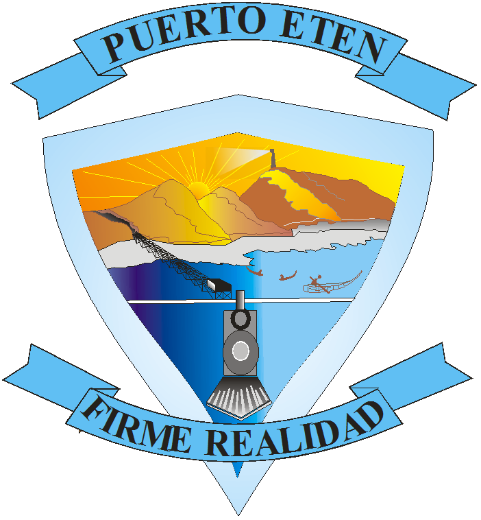 Escudo del Distrito de Puerto Eten